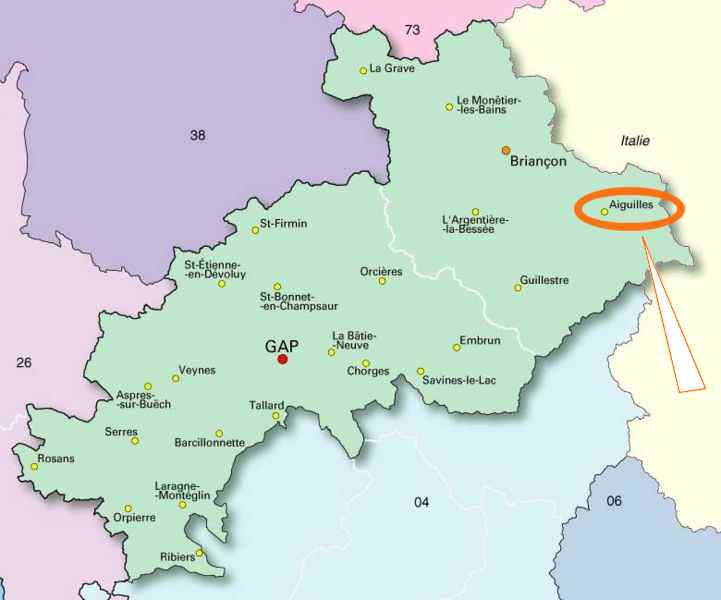 Carte de localisation d'Aiguilles dans les Hautes-Alpes